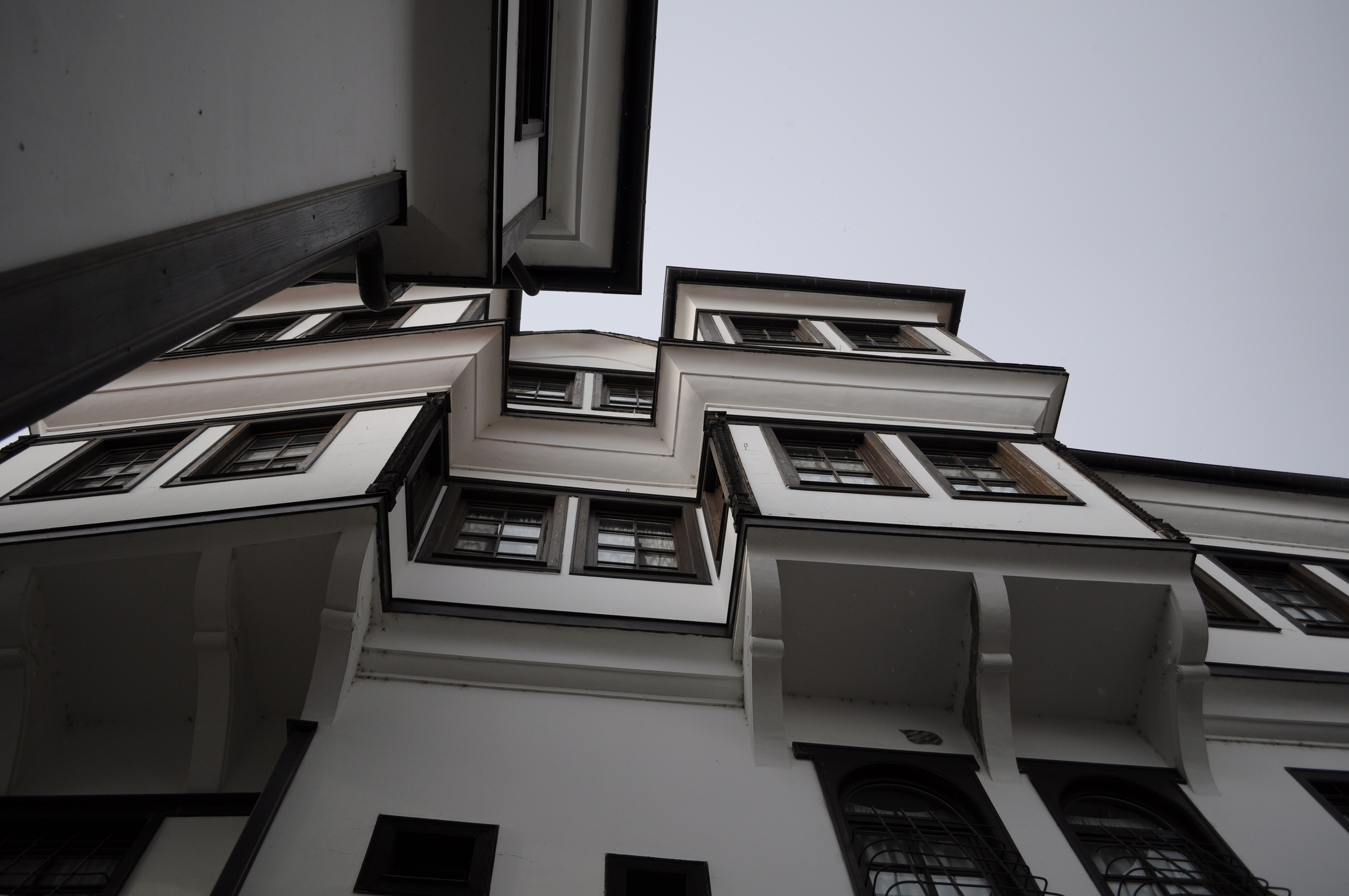 куќата на Робевци во Охрид